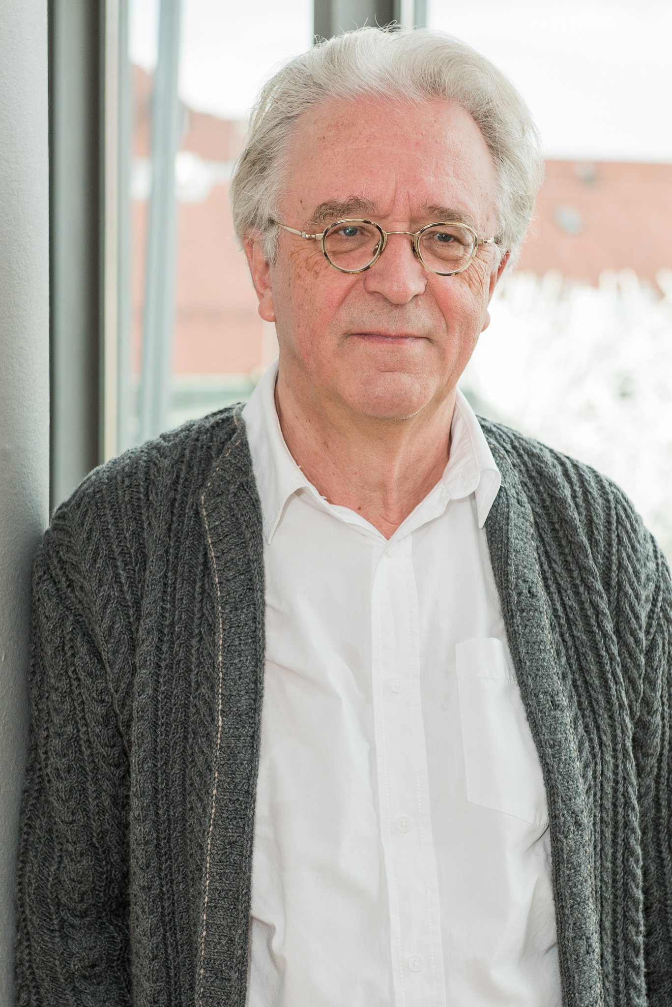 BR,Bayerischer Rundfunk,Bayerisches Fernsehen,Filmbrunch 2015,Gerd Anthoff